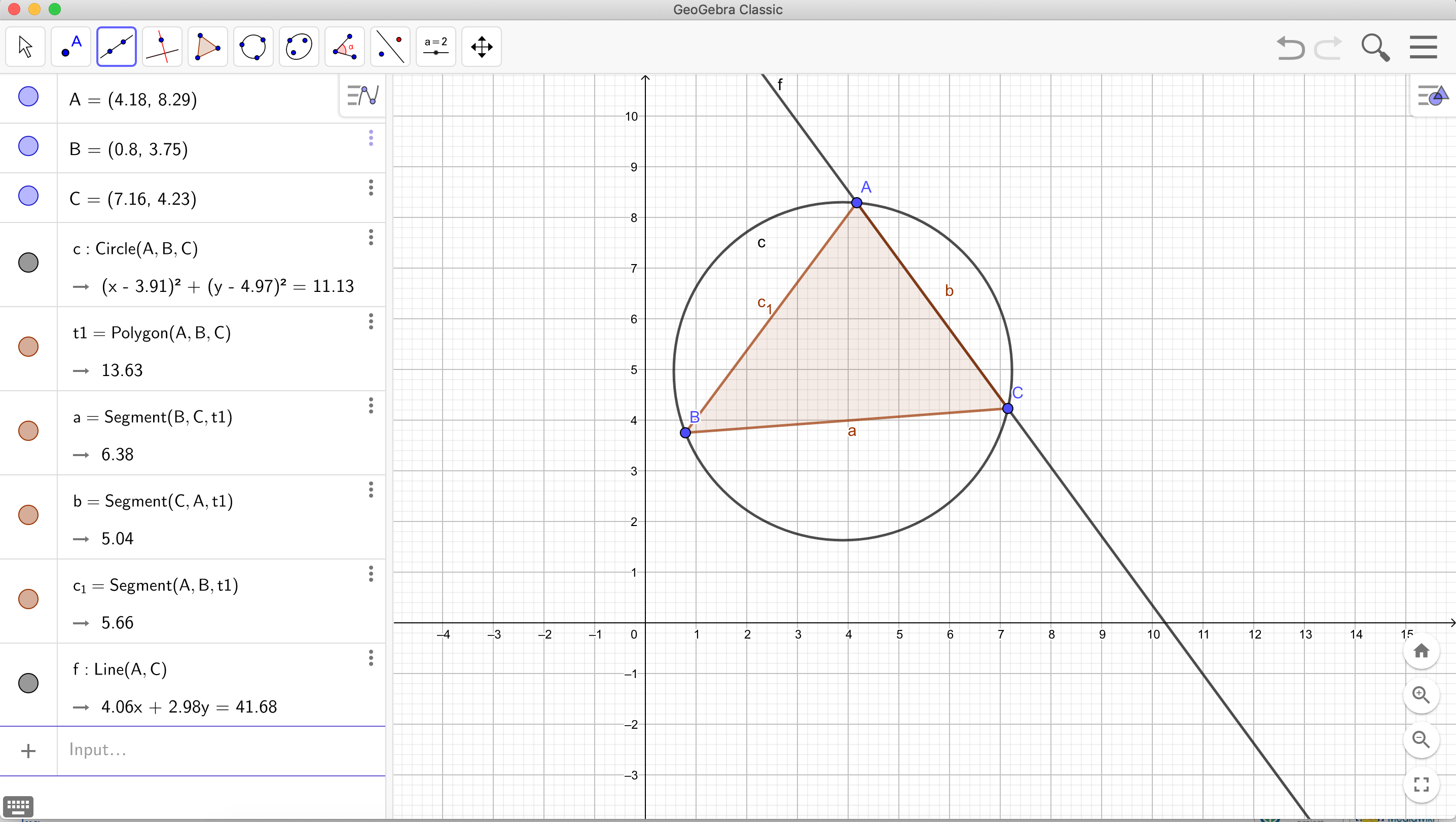 GeoGebra (Classic) 6.0.528.0. GeoGebra 项目目前也提供在线版和两个拆分出来的独立版本(Graphing Calculator and Geometry).